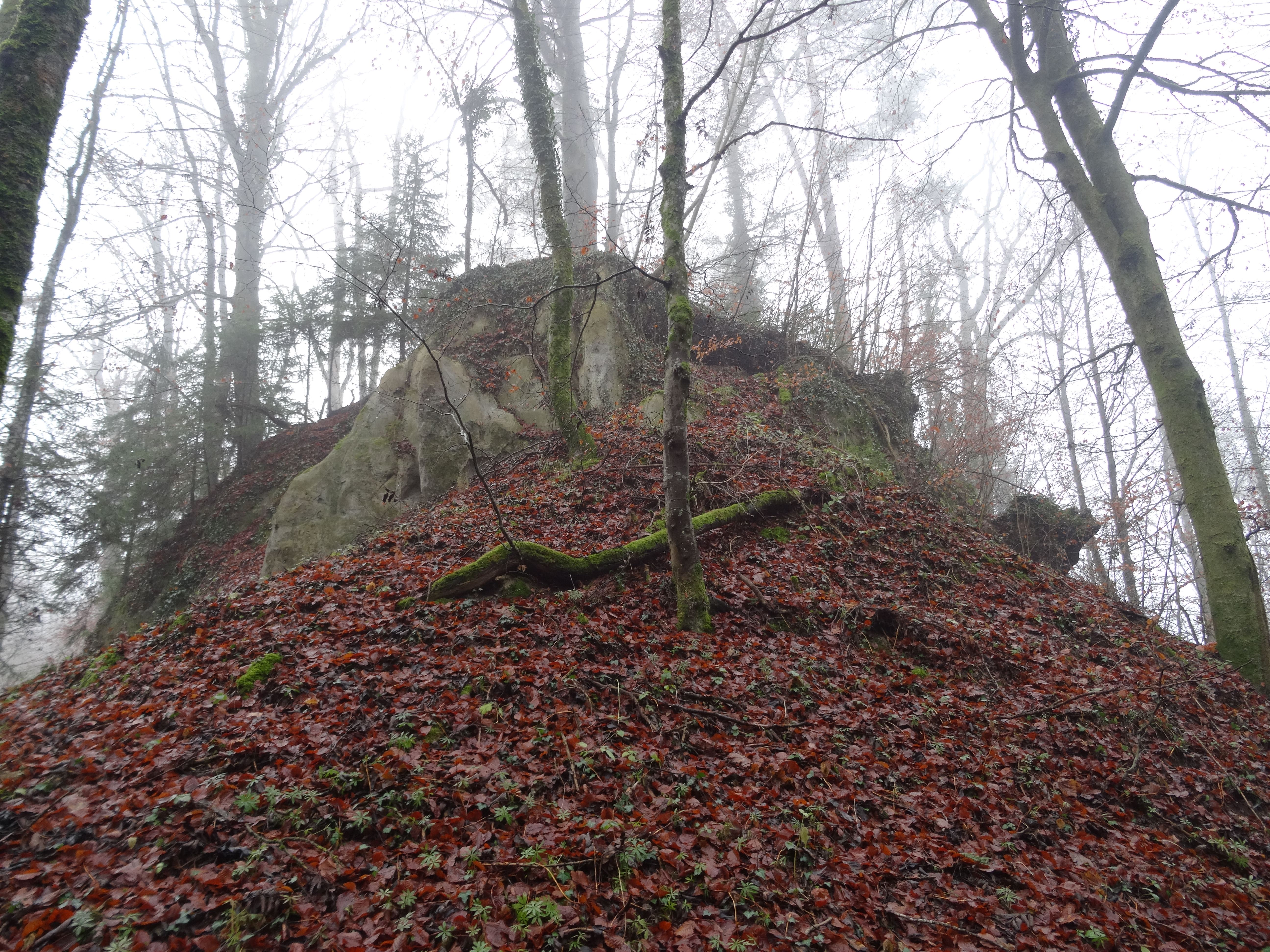 Motte von NE der Burgstelle Alt-Bubenberg